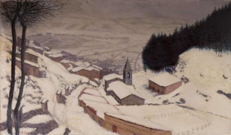 "Paese nella valle innevata, olio su tela, 39 x 67.5 cm, coll. privata